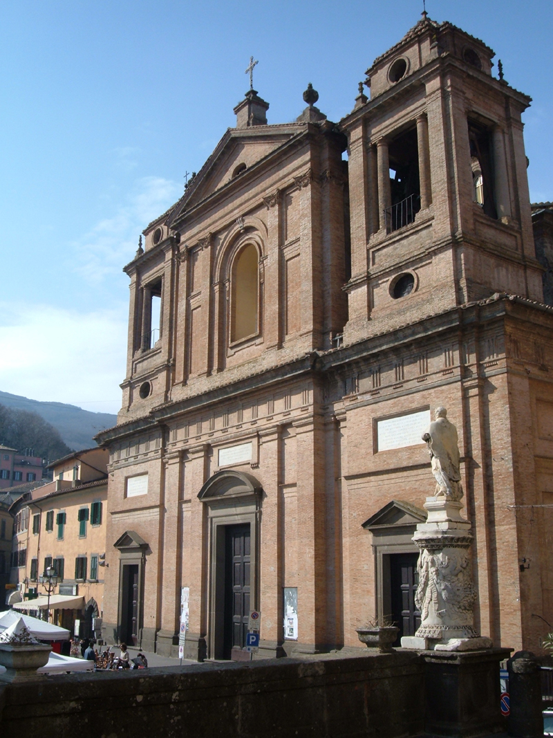 Chiesa di San Nicola di Bari, a Soriano nel Cimino, in provincia di Viterbo.